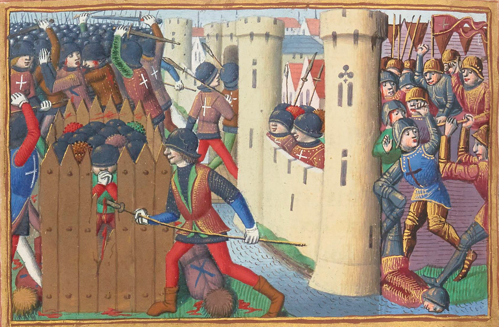 Les troupes françaises défont les Anglais et lèvent le siège d'Orléans en mai 1429.